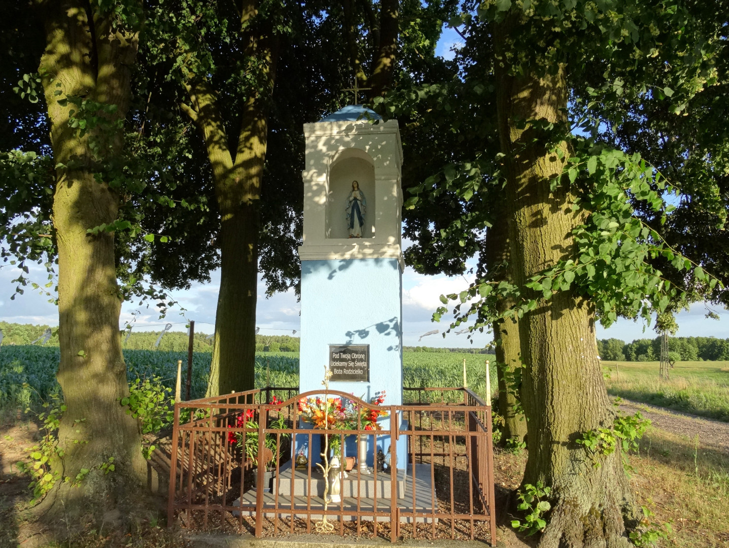 Leszyce, gmina Nowa Wieś Wielka, powiat bydgoski, kapliczka przydrożna